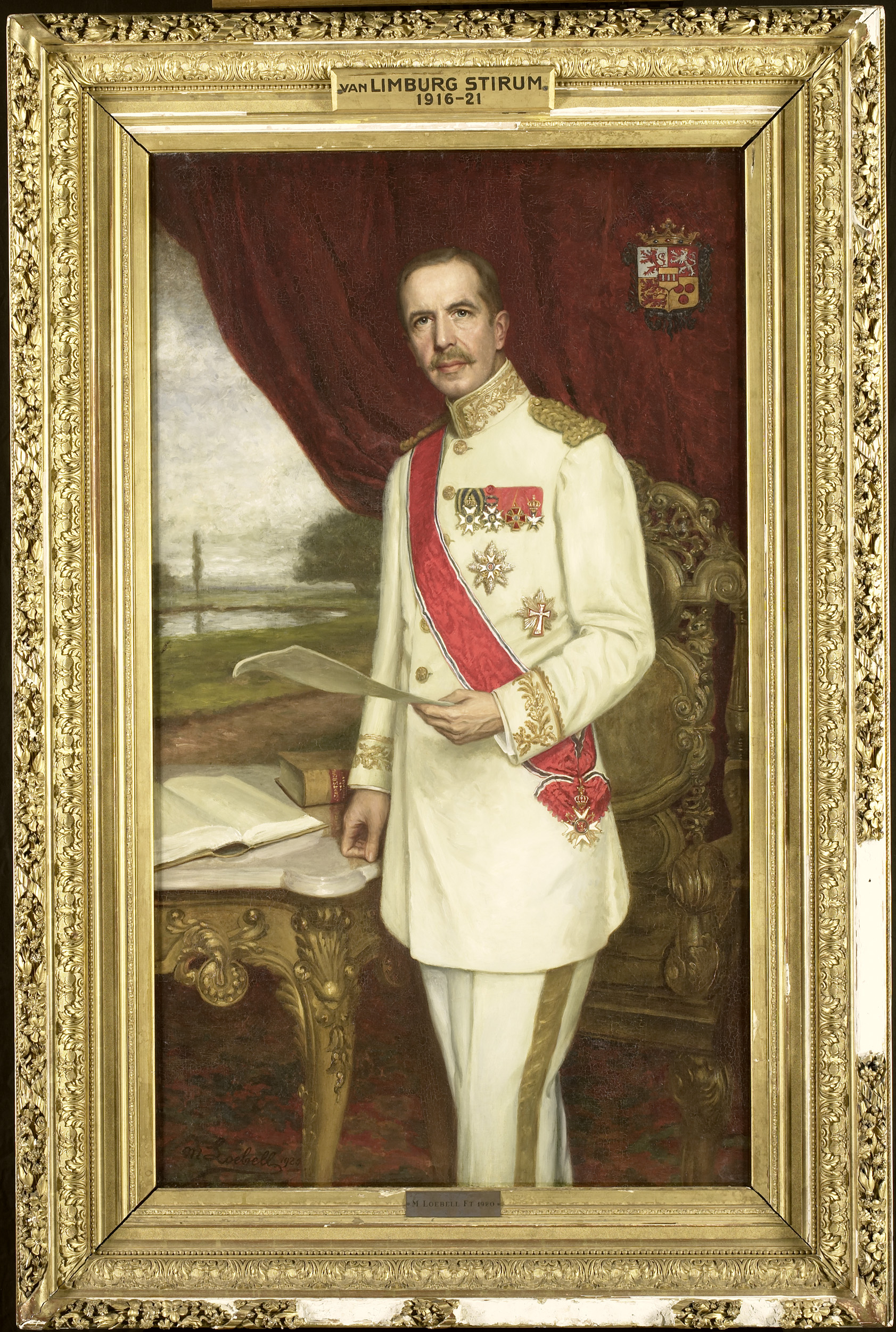 Portret van Johan Paul Graaf van Limburg Stirum (1873-1948). Gouverneur-generaal (1916-21). Kniestuk, staande naast een stoel, iets naar links met het gelaat naar de beschouwer gekeerd. De linkerhand rustend op een tafel waarop enkele boeken liggen, in de rechterhand houdt hij een document. Op de achtergrond een landschap, rechtsboven het familiewapen. Collection: schilderijen; Gouverneurs-generaal serie